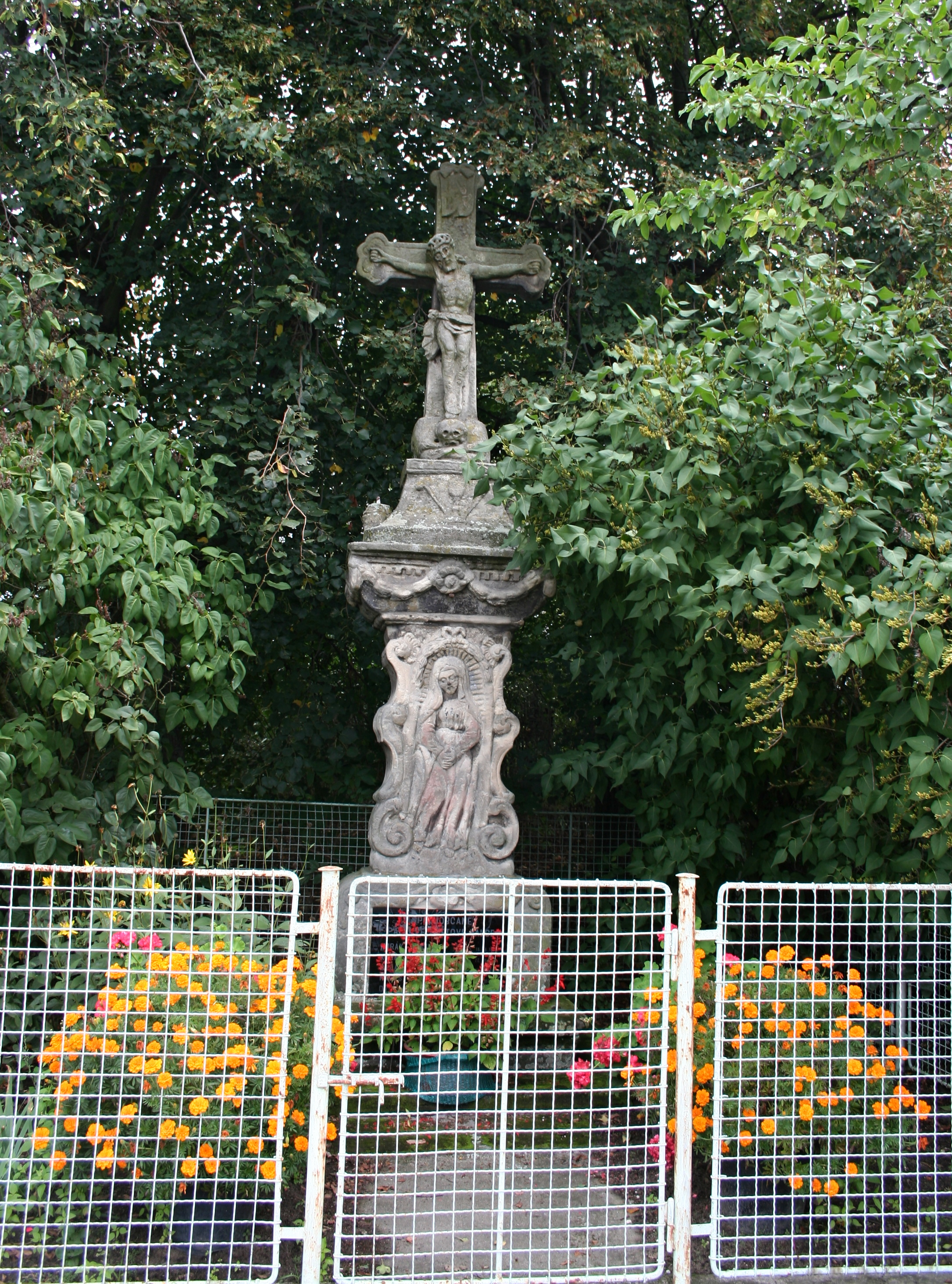 Krucifix (Veská), při silnici na S okraji obce, Veská